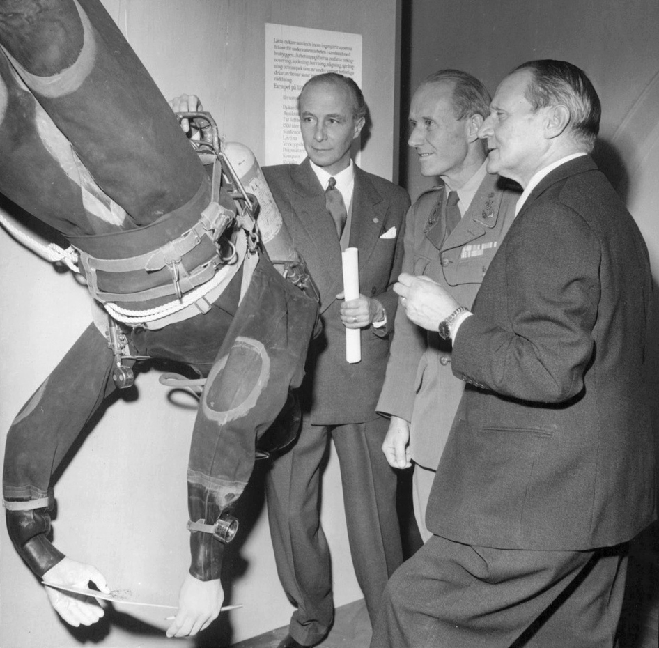 Fil.dr. Heribert Seitz, inspektören för ingenjörstrupperna överste Stig Berggren och major T. von Zweibergk studerar en grodman på museet. En aktuell hundraåring visar sitt ansikte på Armémuseum från och med söndagen. Då får allmänheten tillgång till vintersäsongens första "aktuella hörn", och som sig bör är detta ägnat åt de jubilerande ingenjörstrupperna. Det är ett vapenslag som kräver stor plats, med all den materiel man förfogar över. Den vanliga "hörnan" har mycket riktigt måst utökas för att kunna presentera allt som hänt sedan det första sappörkompaniets tillkomst och till våra dagar, här representerade av en grodman och modern brobyggnadsmateriel.